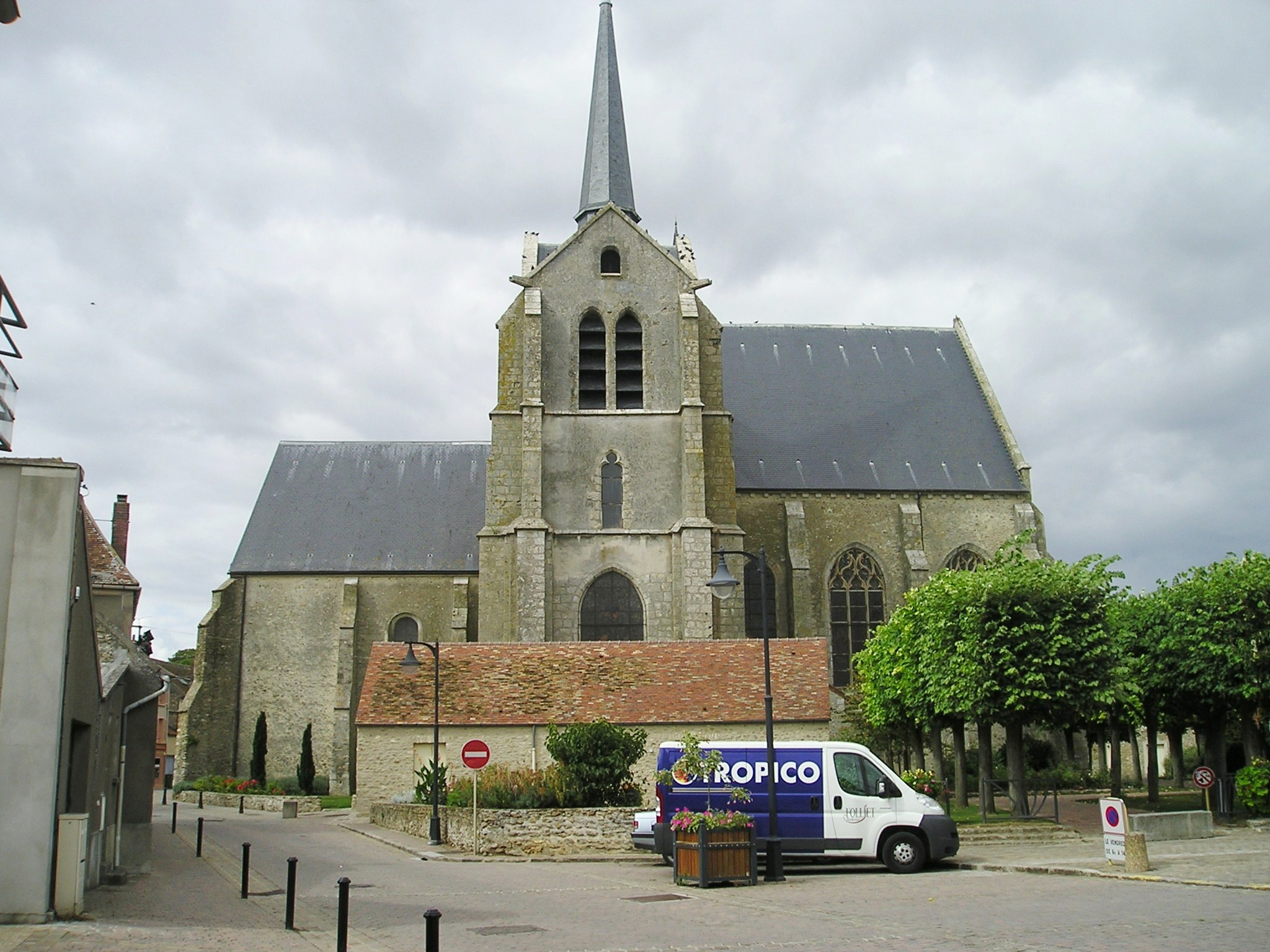 Kath. Kirche_St-Pierre_in_Ablis